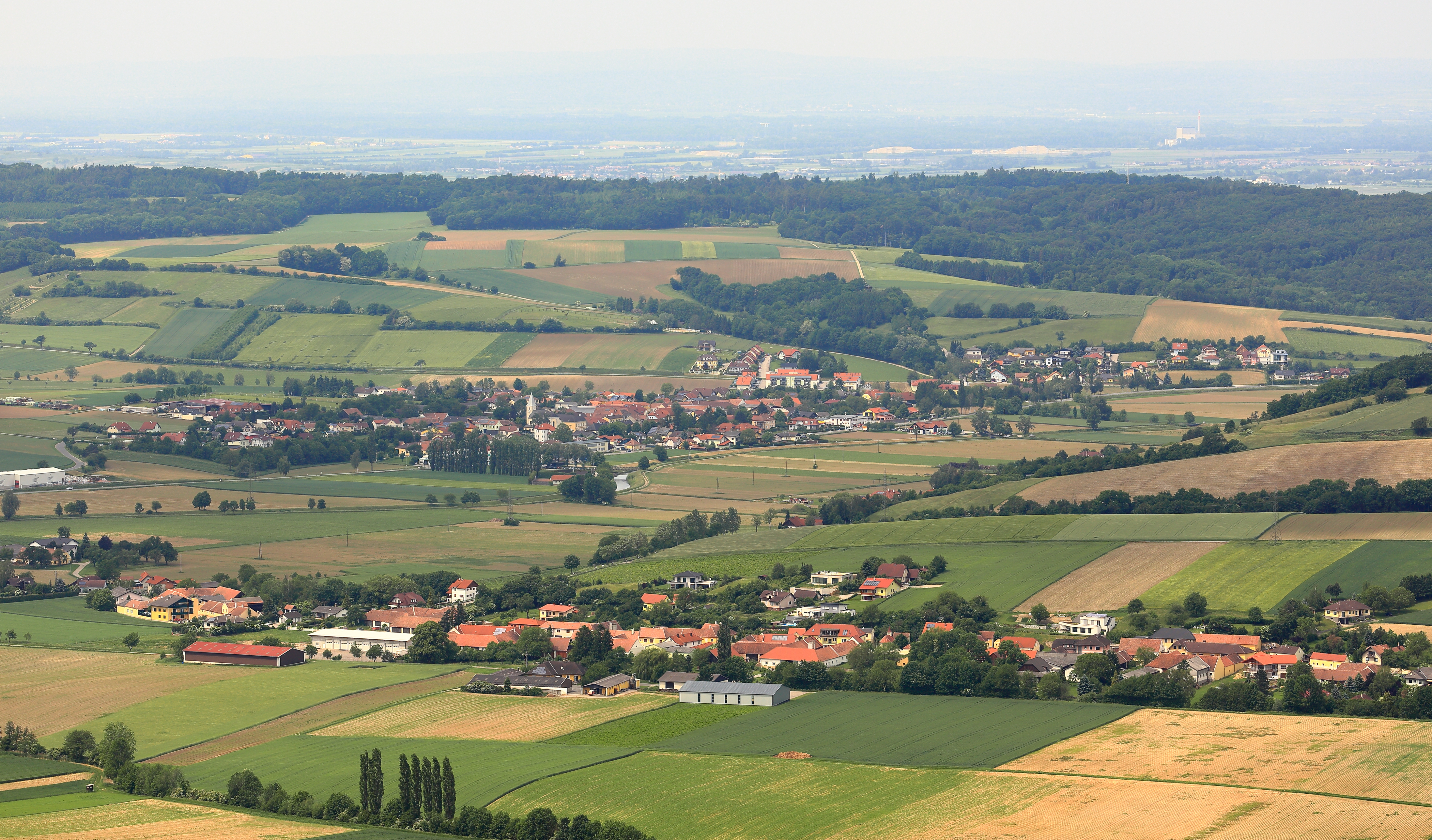 Blick von der Buchbergwarte Richtung Norden. In der Bildmitte Asperhofen und davor die Ortschaft Grabensee, ebenfalls zur niederösterreichischen Marktgemeinde Asperhofen gehörend.